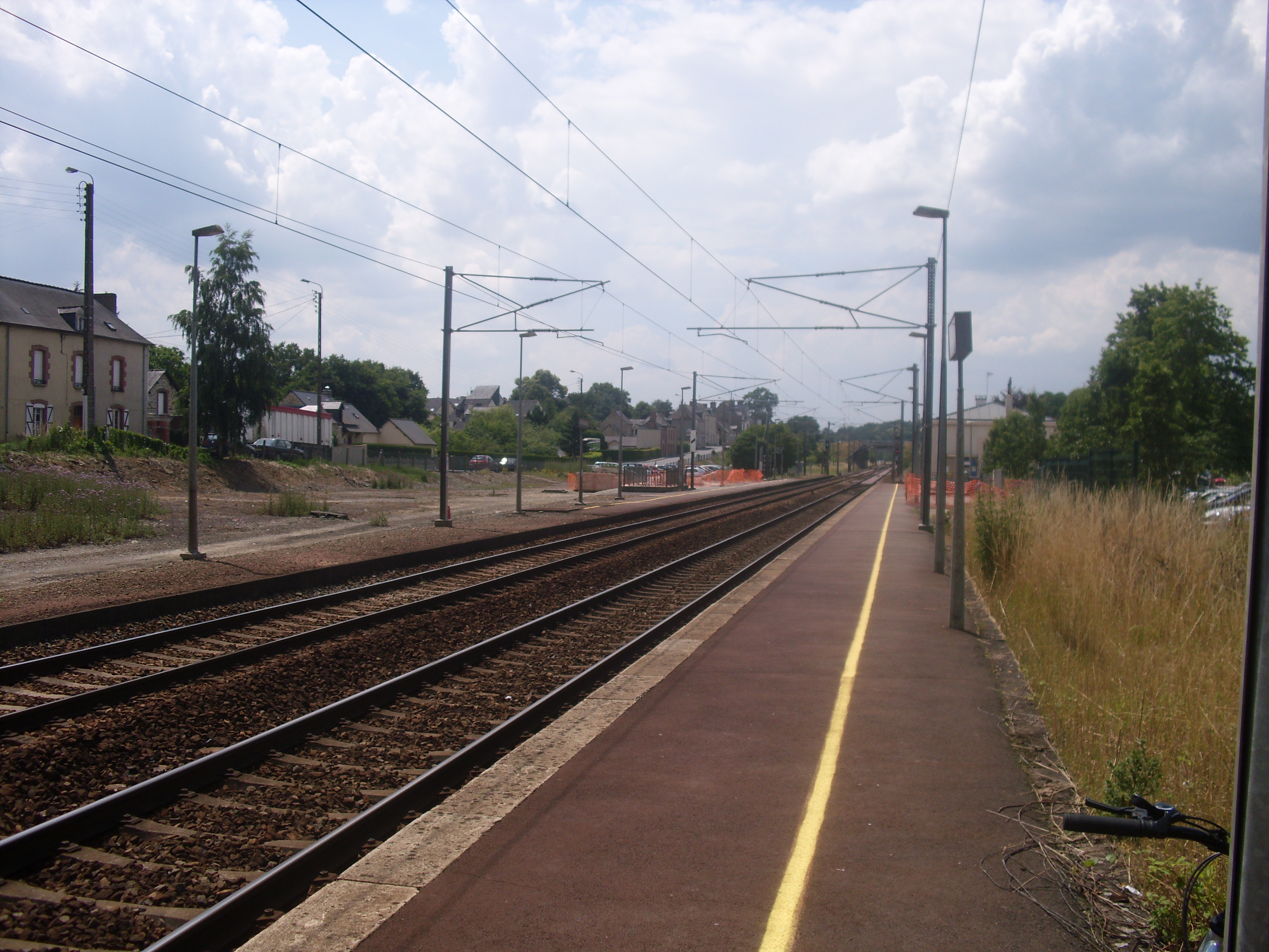 Quai de Châteaubourg